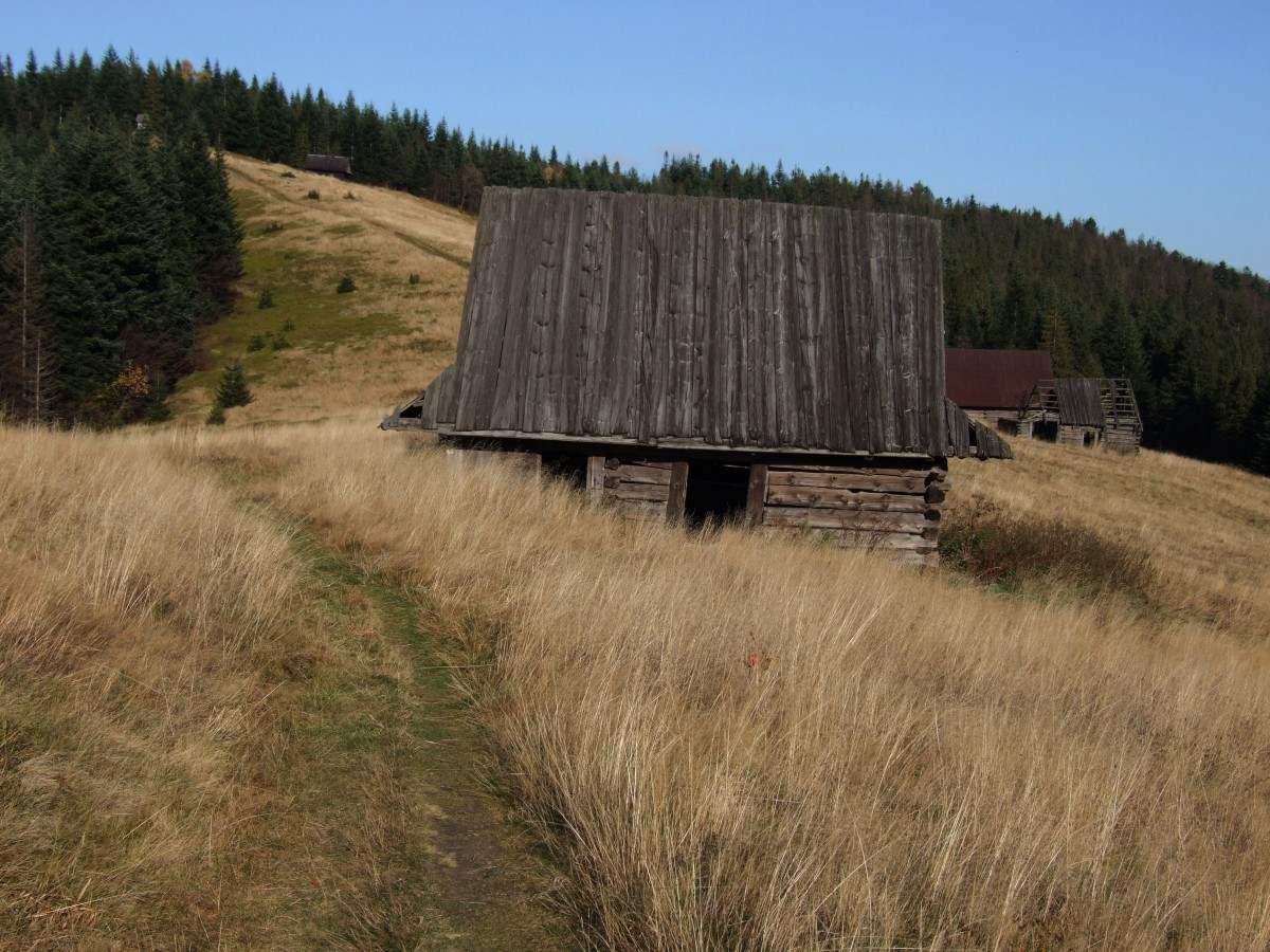 Polana Podskały w Gorcach